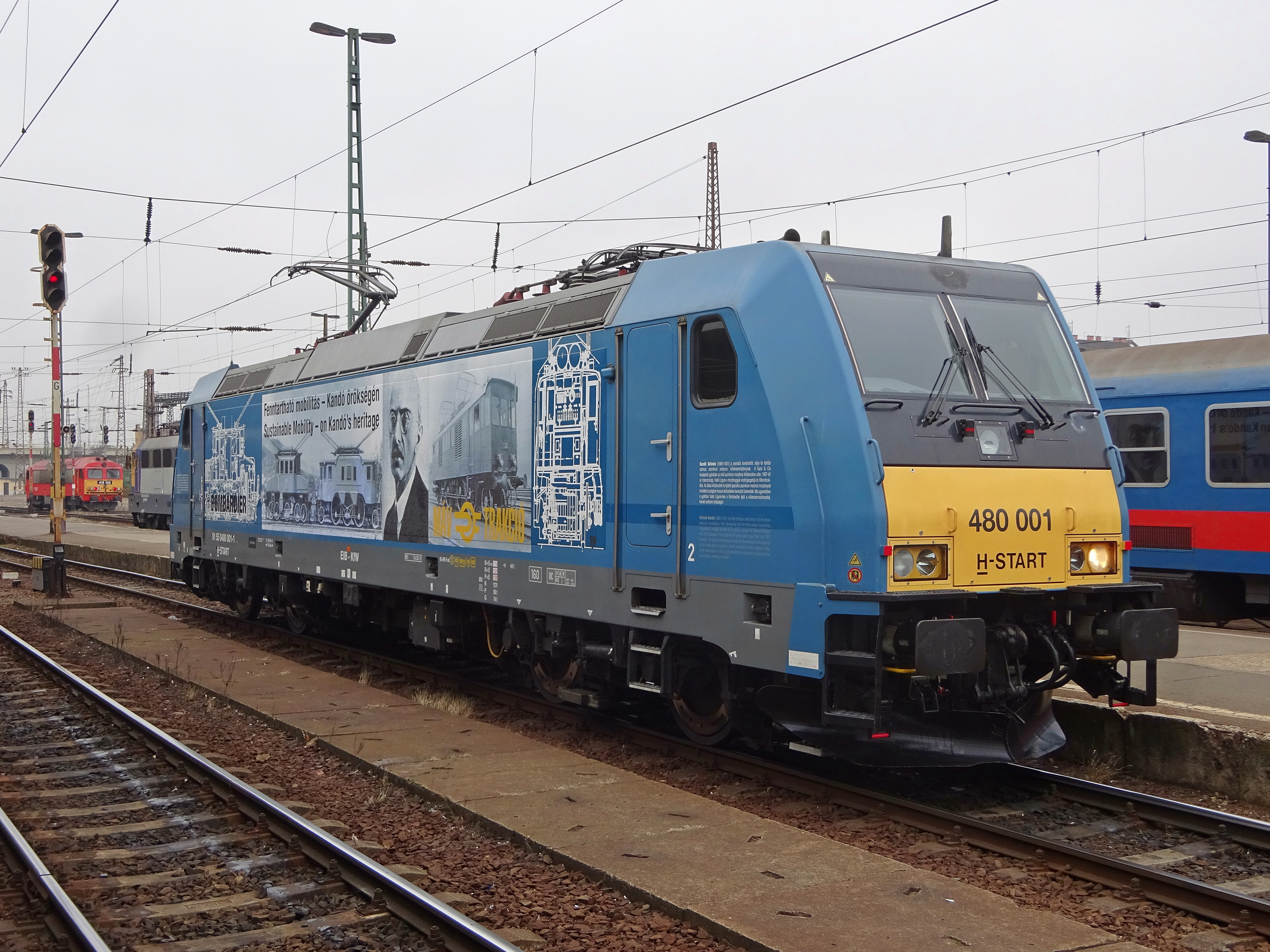 A 480 001-es, Kandó matricás Traxx a Nyugati pályaudvaron.